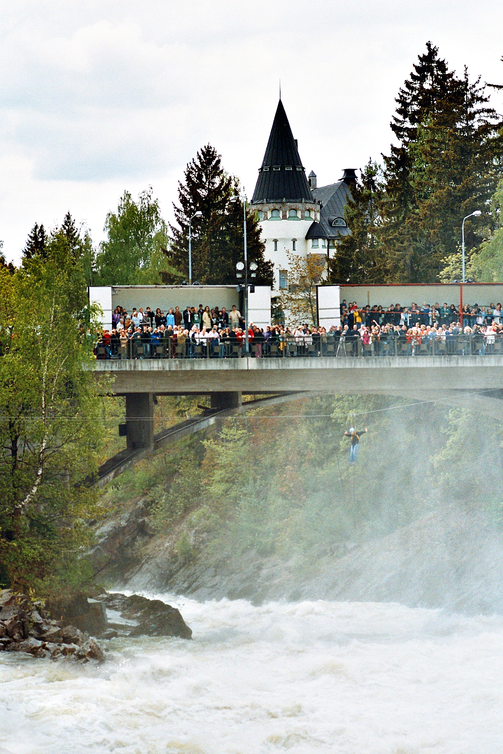 Imatrankosken vaijeliuku padolta